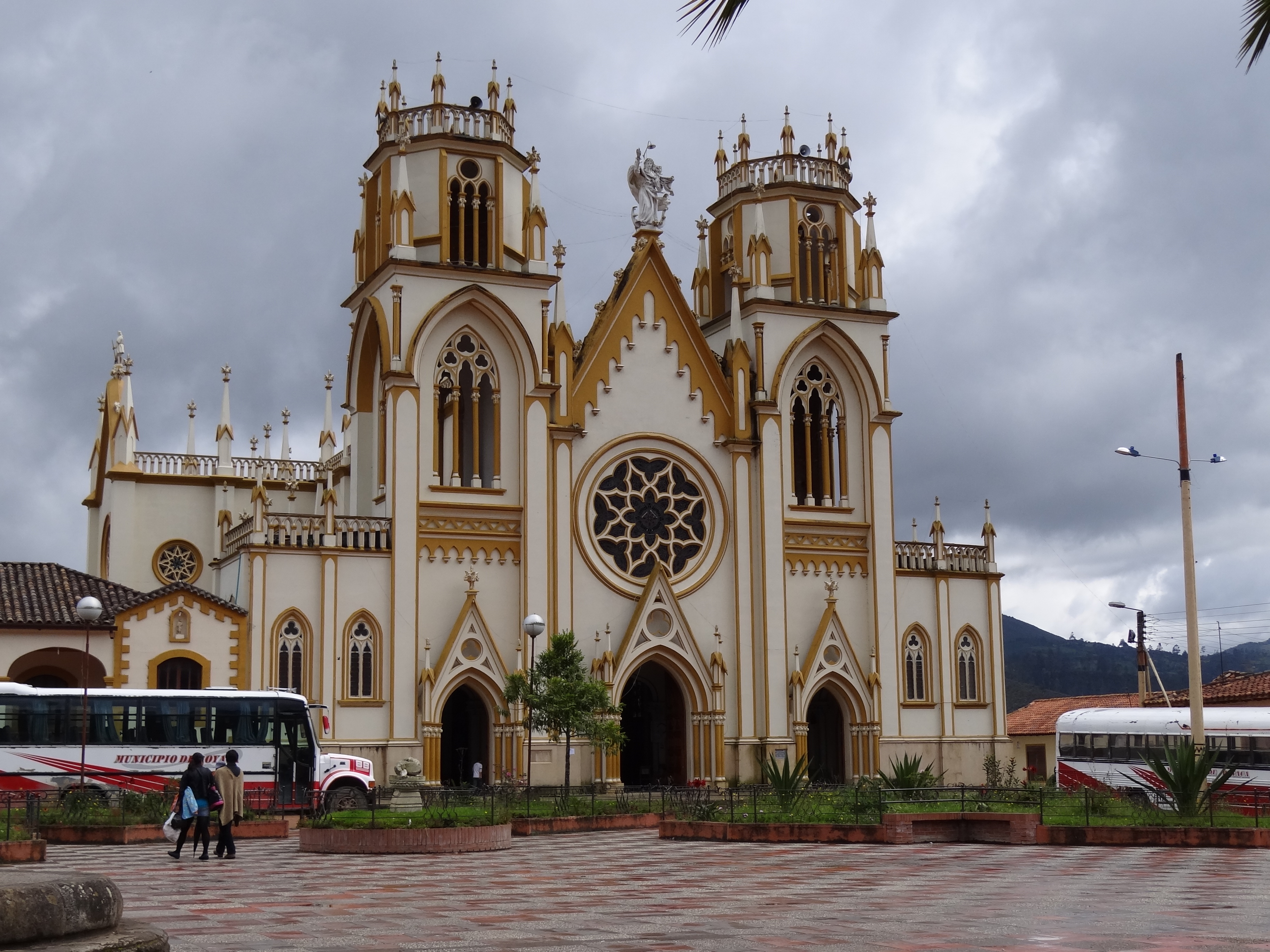 Iglesia en el área urbana del municipio de Boyacá, departamento de Boyacá, Colombia